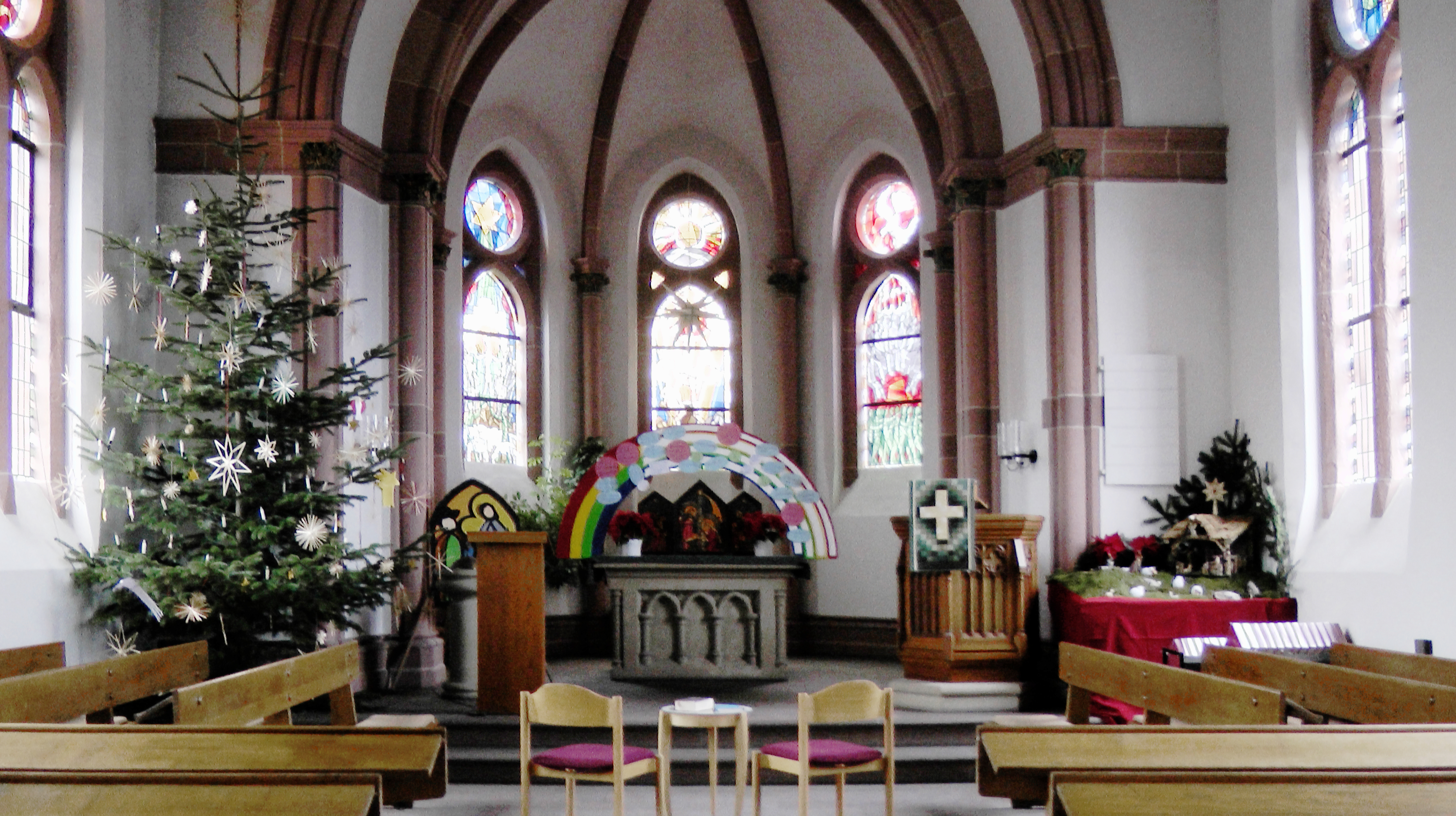 Evangelische Kirche Saarburg im Weihnachtsschmuck